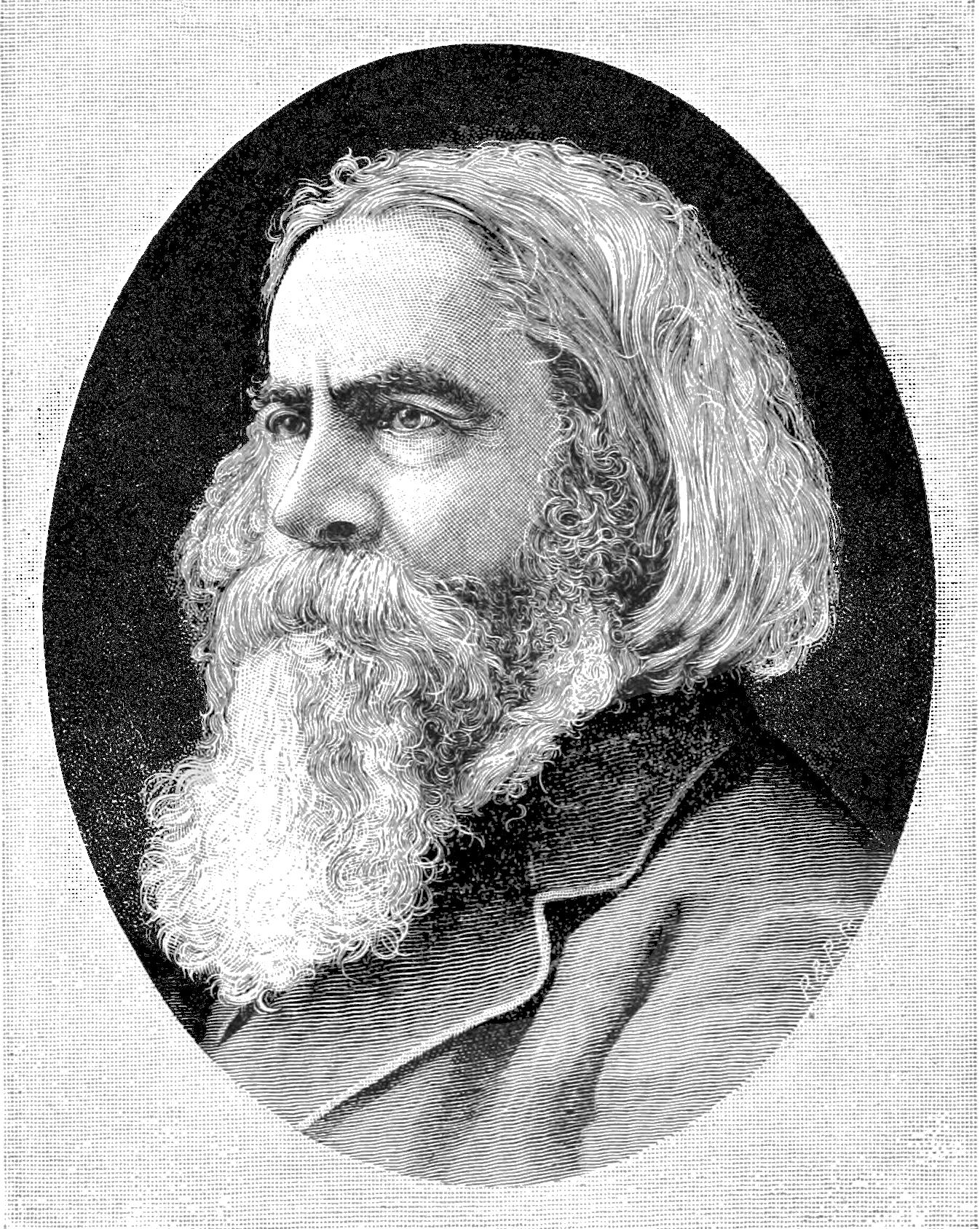 Benjamin Peirce